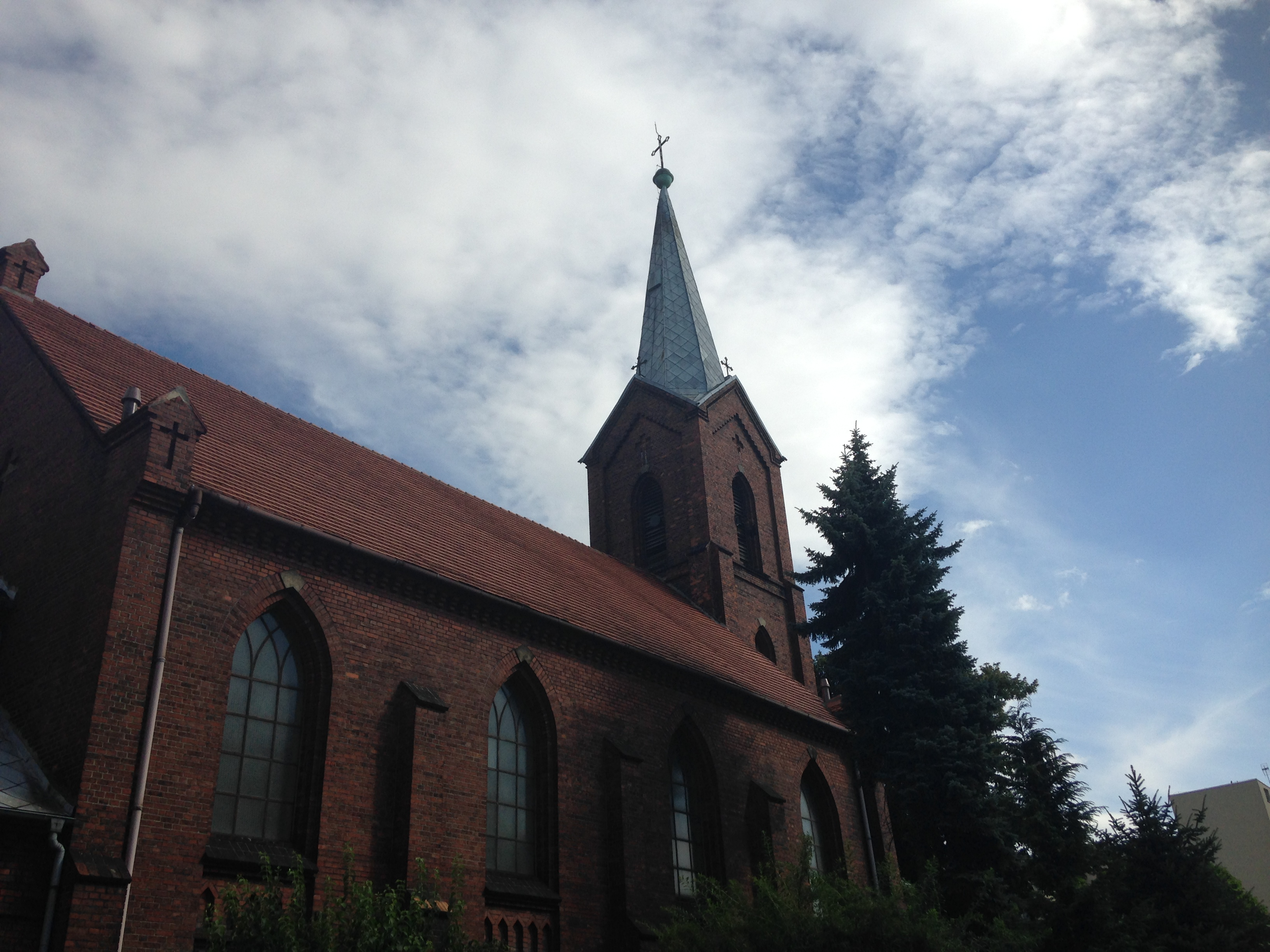 Kościół ewangelicko-augsburski świętego Łukasza w Brzegu – kościół parafialny należący do diecezji katowickiej Kościoła Ewangelicko-Augsburskiego w RP. Znajduje się w Brzegu, w województwie opolskim.